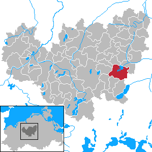 Teterow in Mecklenburg-Vorpommern - District Güstrow